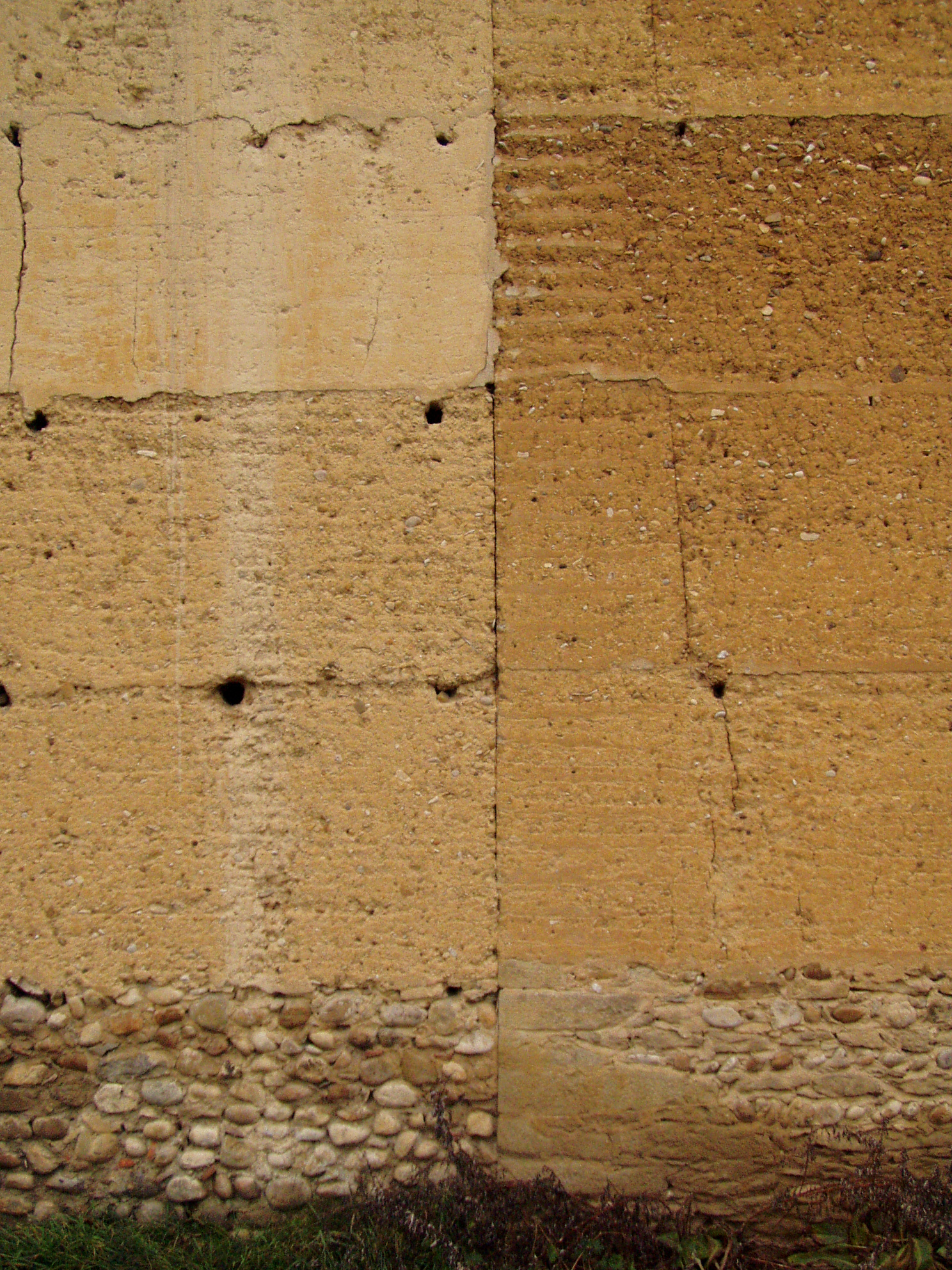 Mur en pisé (non stabilisé) dans le Nord-Isère, 2005 Pisé wall(rammed earth, not stabilized)in Nord-Isère, France, 2005